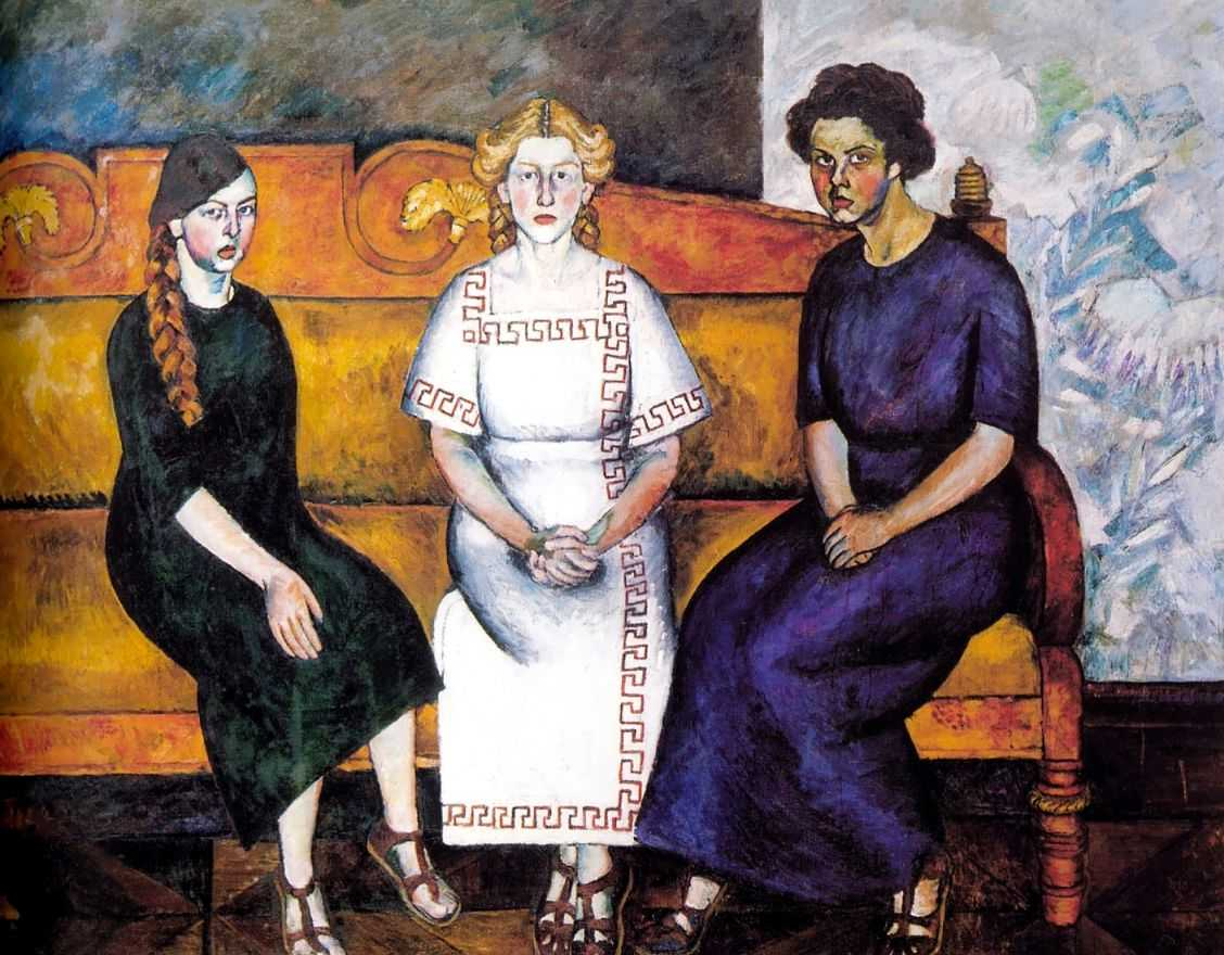 Машков Илья Иванович. Три сестры на диване. Портрет Н.,Л. и Е.Самойловых. 1911